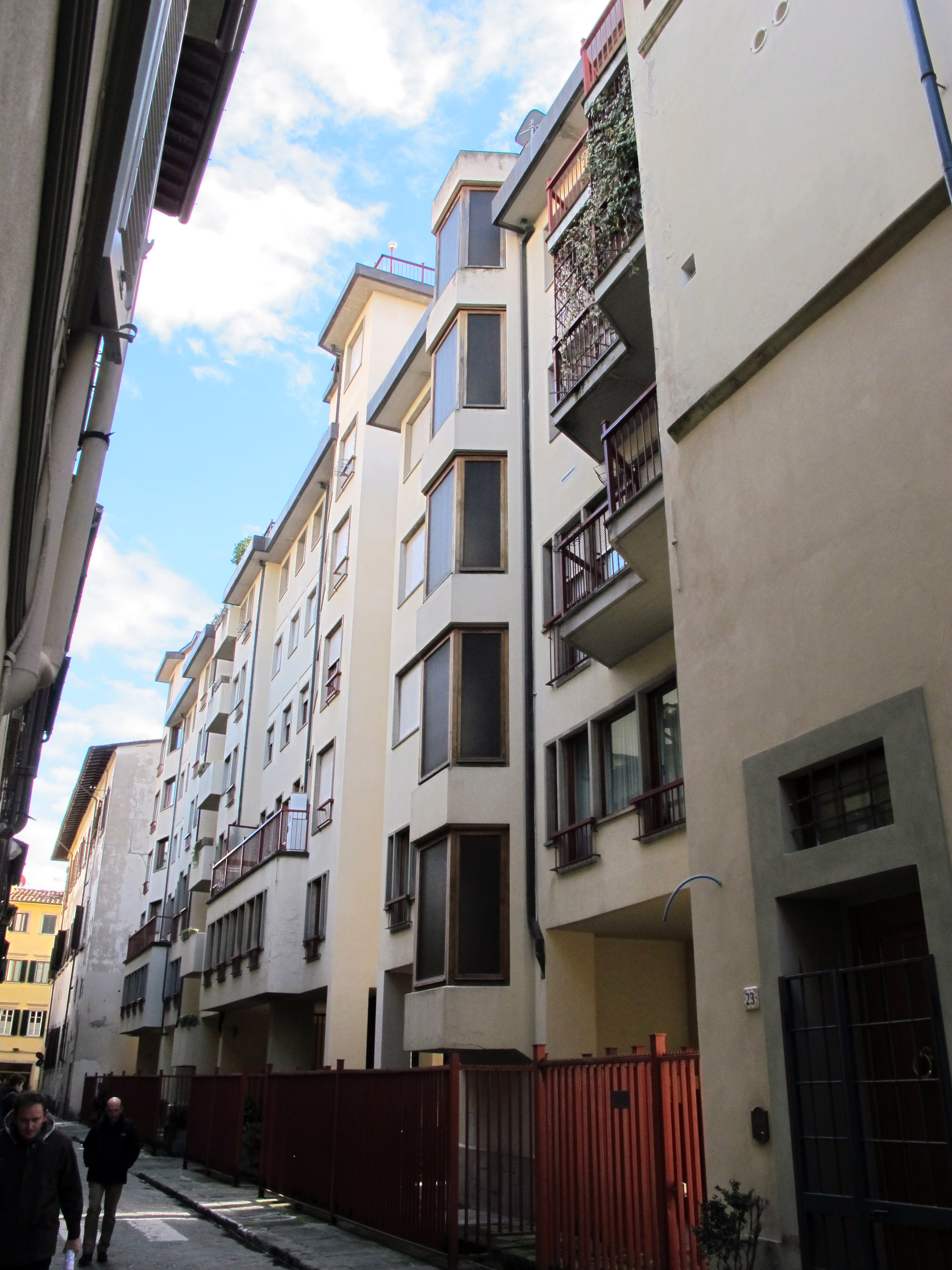 Firenze